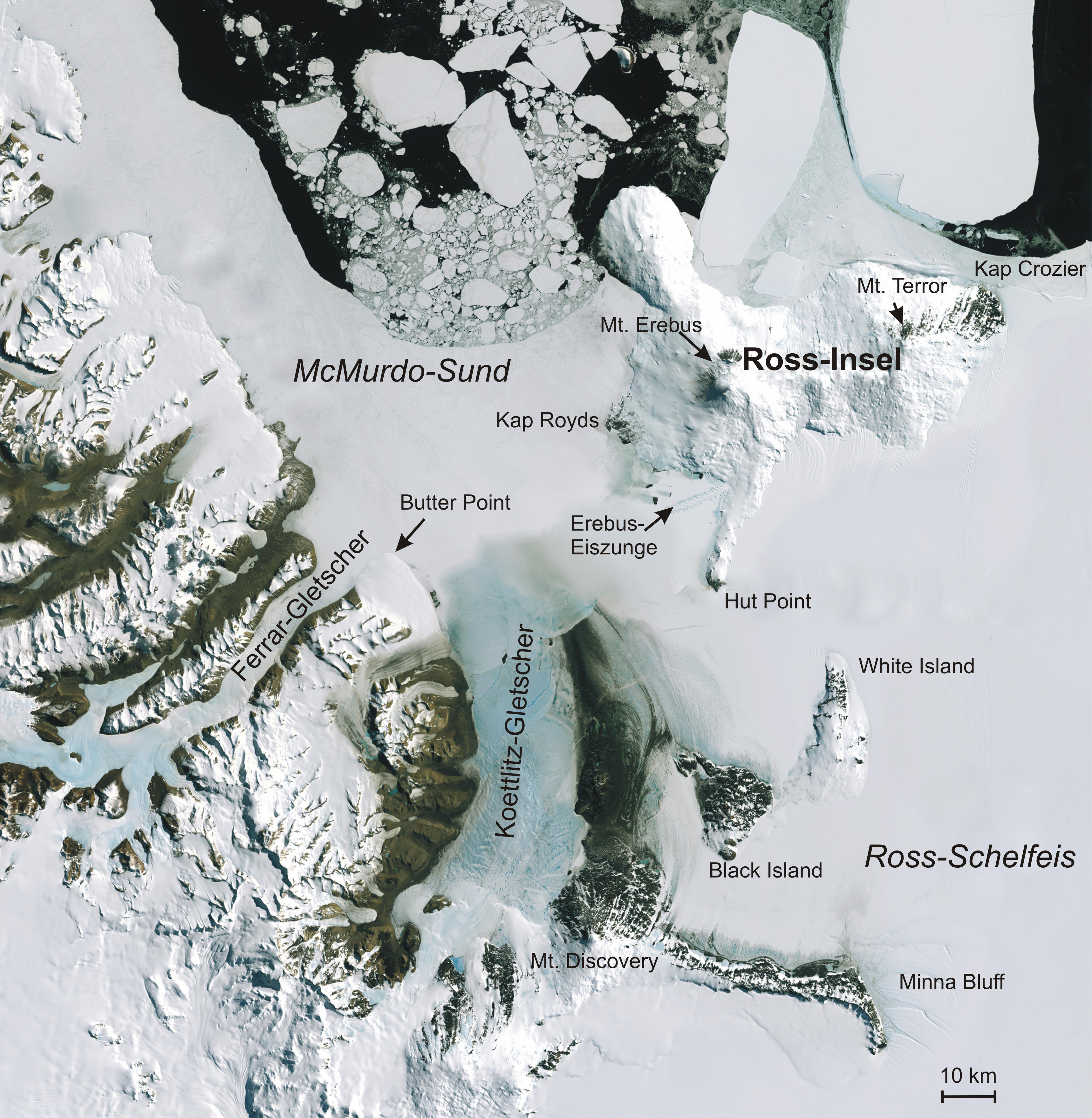 Satelliten-Aufnahme des McMurdo Sound und der Ross-Insel